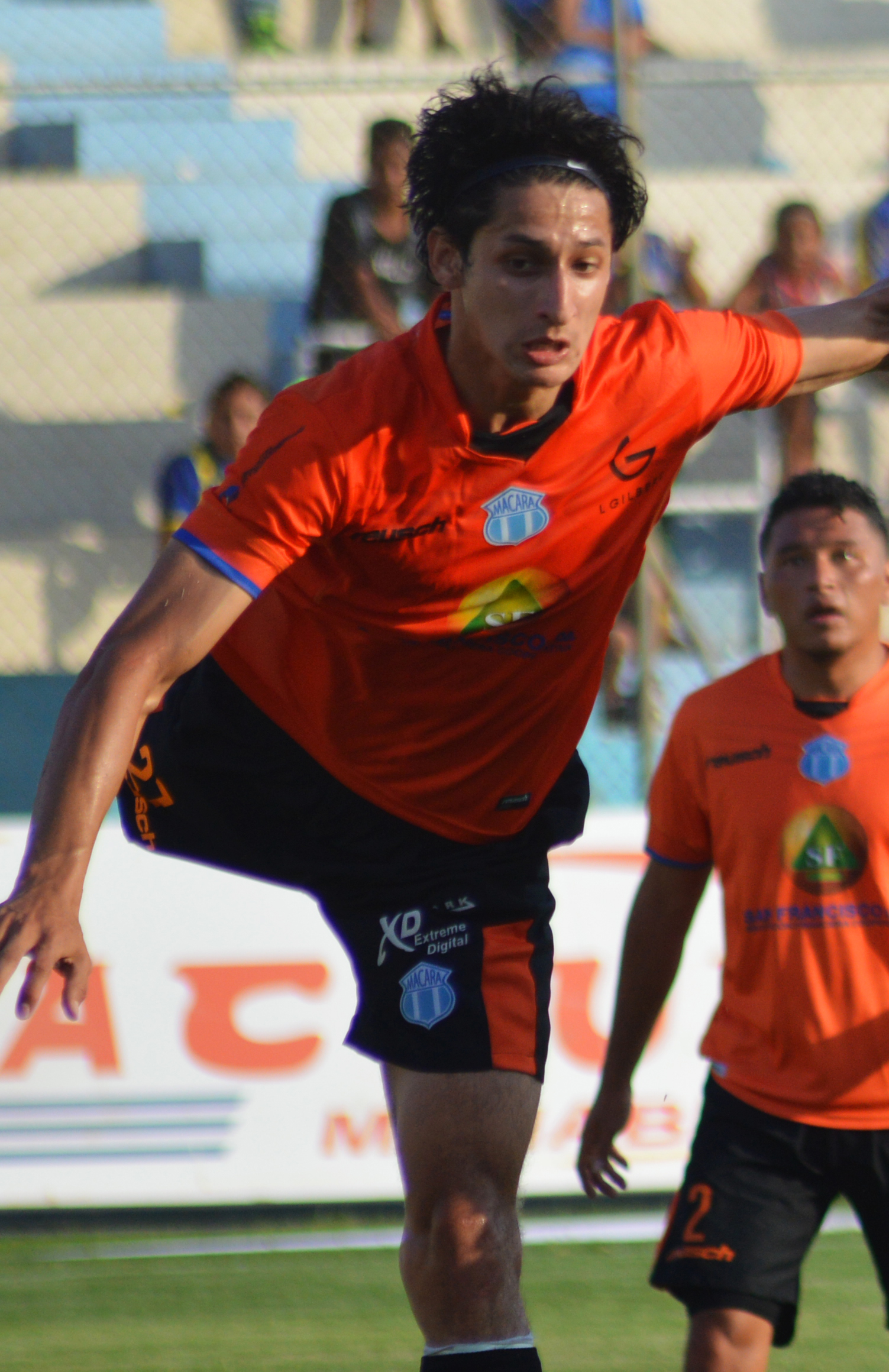 Ángel Ledesma jugando para Macará en 2015